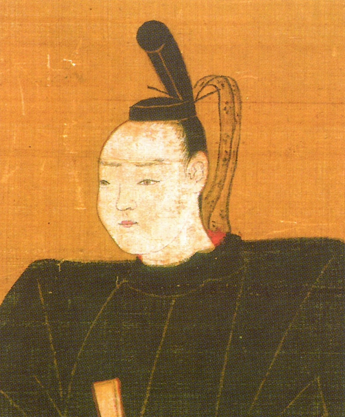 堀尾忠晴の肖像(部分)。